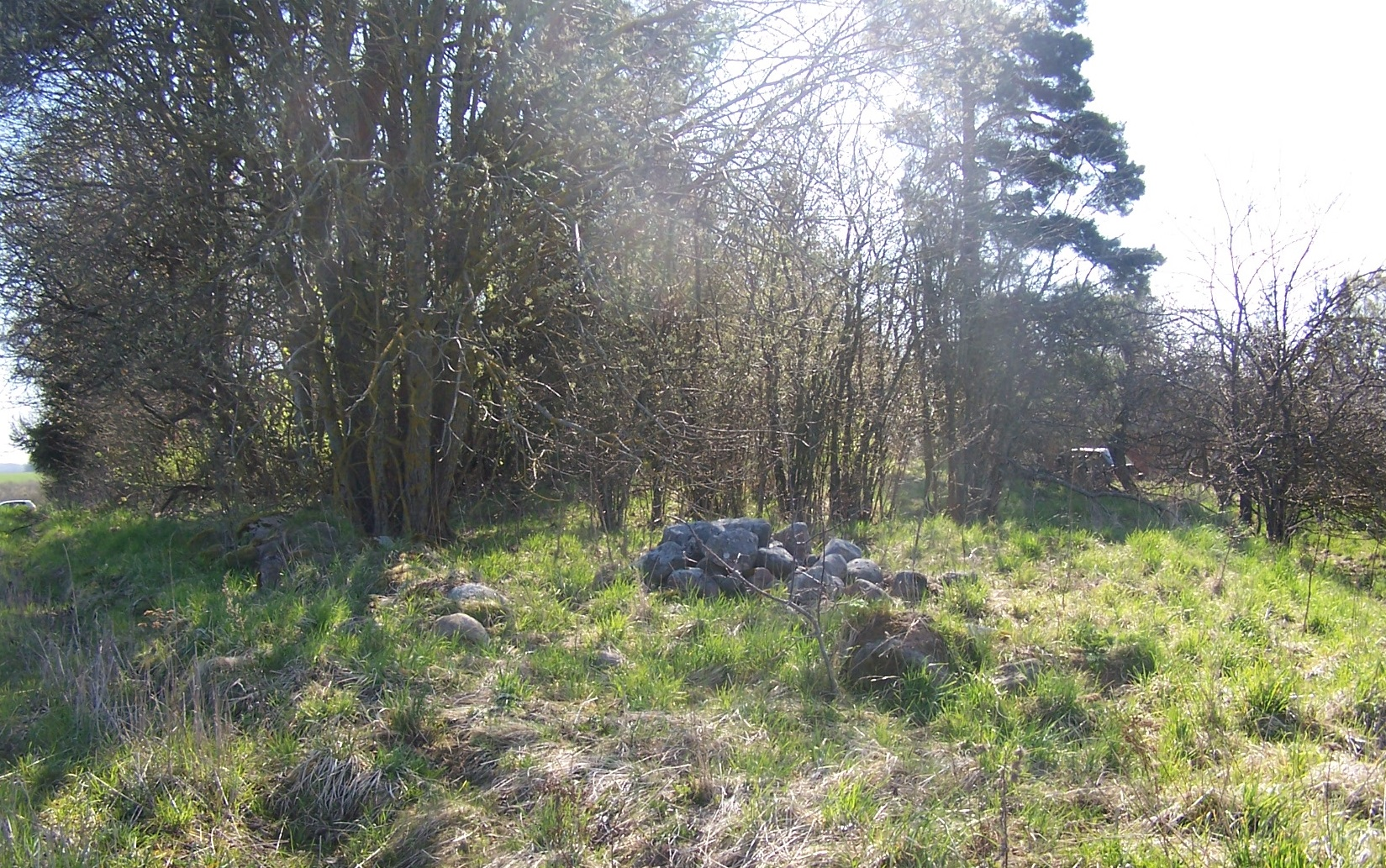 Girbučių pilkapis